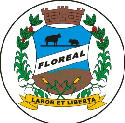 Brasão de Armas do município paulista de floreal, Brasil.